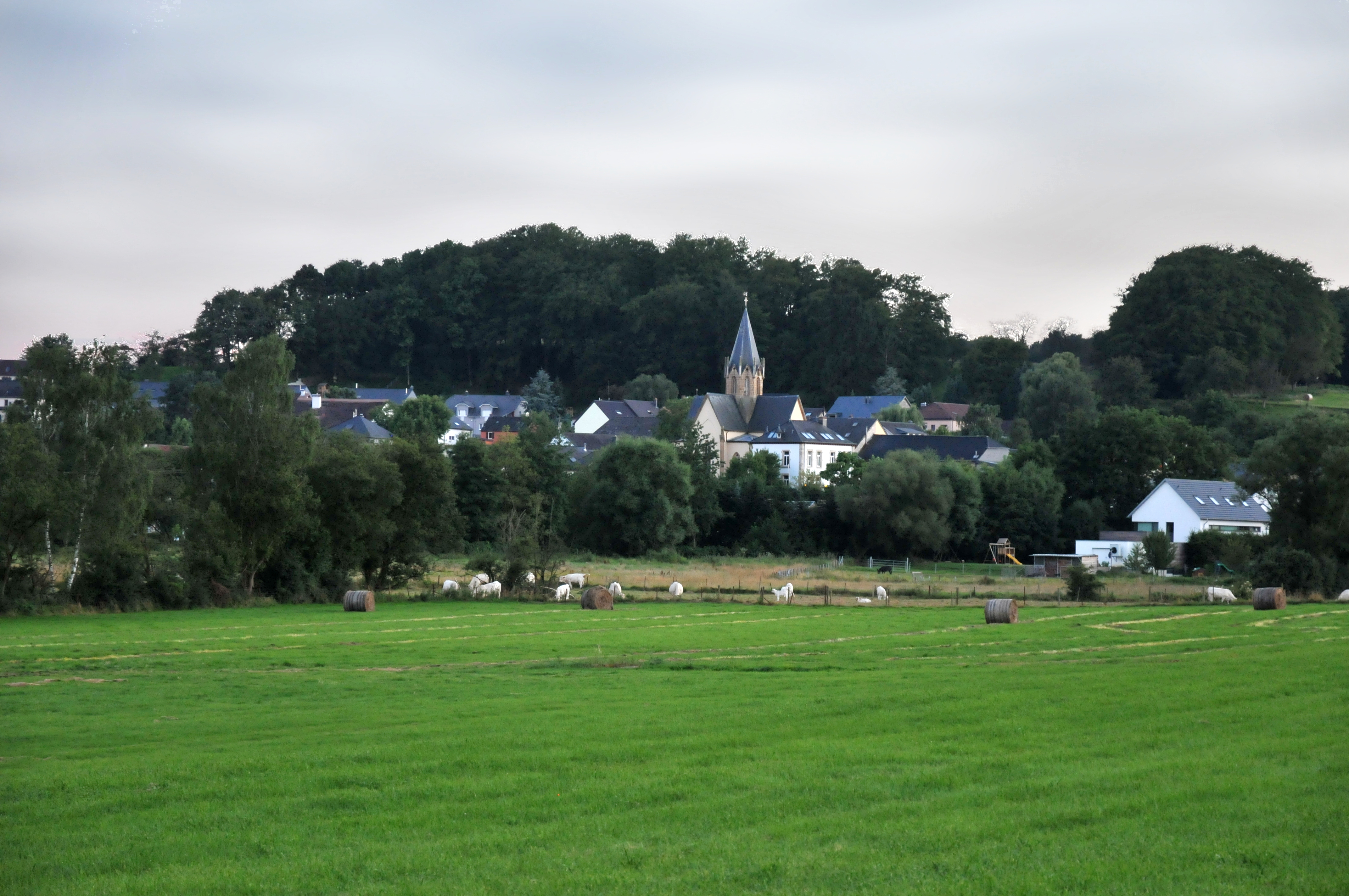 Vue op Siren.